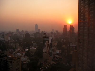 墨西哥城的清晨，墨西哥城是墨西哥的首都，也是全世界人口最多的高原都會區（全市平均海拔2,240公尺），大墨西哥城地區共有超過2,200萬的人口，密度驚人。由於人口稠密且大眾運輸缺乏，居民普遍以污染極高的老舊設計車輛作為交通工具，再加上墨西哥城本身為一盆地地形不通風，因此城內空氣污染異常嚴重。本照片的拍照時間實際上是墨西哥城當地早上七、八時的清晨，但因為早晨交通尖峰時間空氣污染嚴重，使得朝陽看起來猶如一般城市的夕陽般殷紅。本照片中所見，是由墨西哥城總統洲際飯店(Hotel Presidente InterContinental Mexico City)向南方俯視的城市一隅。本圖片由上傳者SElephant拍攝於2003年2月。